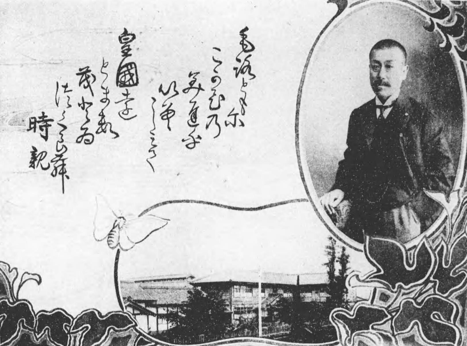 明治40年頃の三吉米熊及び小県蚕業学校